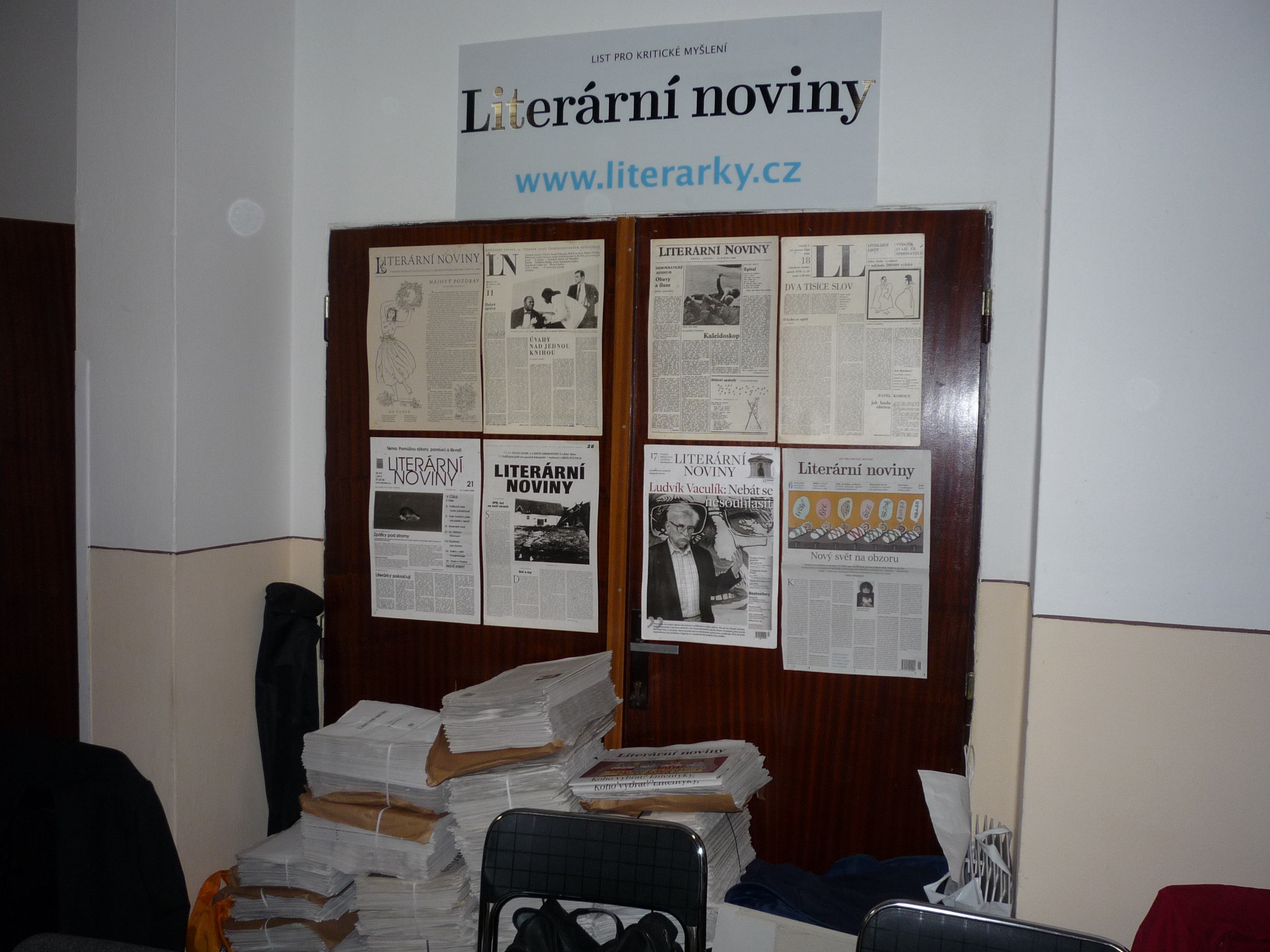 Autor fotografie Jiří Zelenka. Knižní veletrh 2016. Kulturní dům Ostrov. Havlíčkův Brod. Kraj Vysočina. Czech Republic.